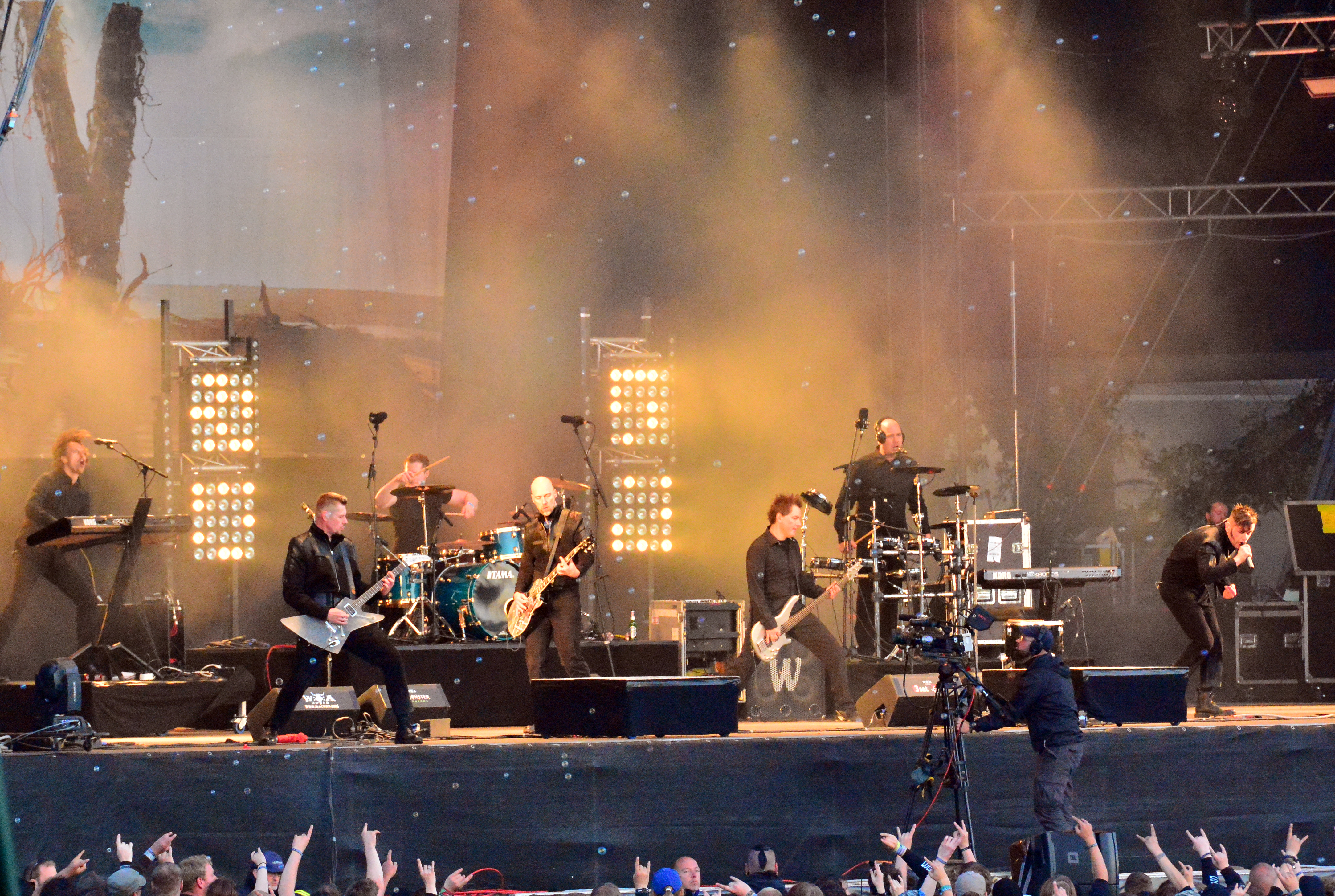 Oomph! beim Wacken Open Air 2015